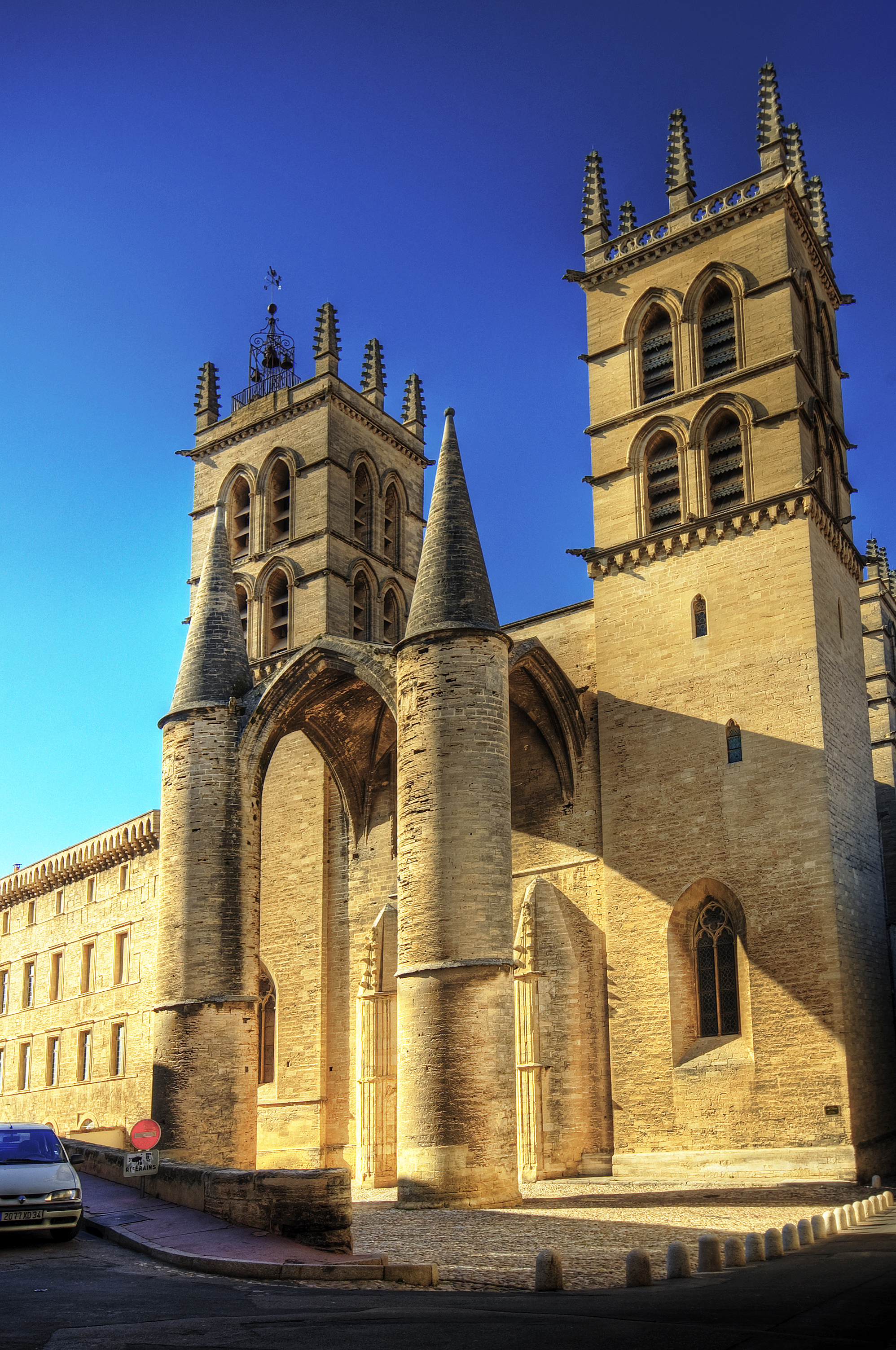 Take here a large view! La cathédrale Saint-Pierre de Montpellier était à l'origine la chapelle du monastère bénédictin de Saint-Benoît, fondée en 1364, par le pape Urbain V. Cette église fut érigée en cathédrale en 1536, lorsque le siège épiscopal est transféré de Maguelone à Montpellier. L'historienne montpelliéraine Louise Guiraud décrit précisément l'architecture du bâtiment ainsi que la composition des différentes chapelles. From Wikipedia, the free encyclopedia